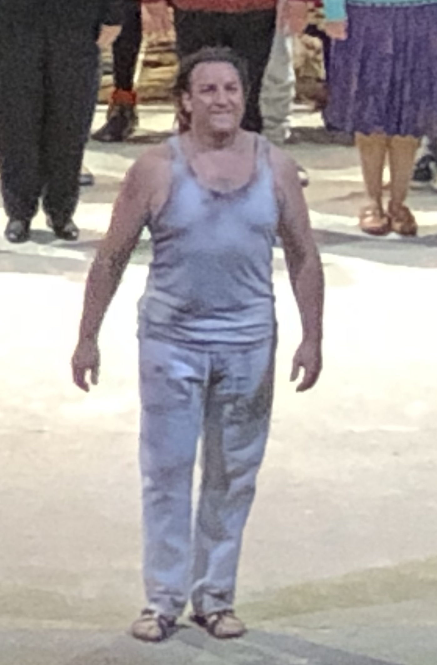 Les Pêcheurs de perles Liceo de Barcelona